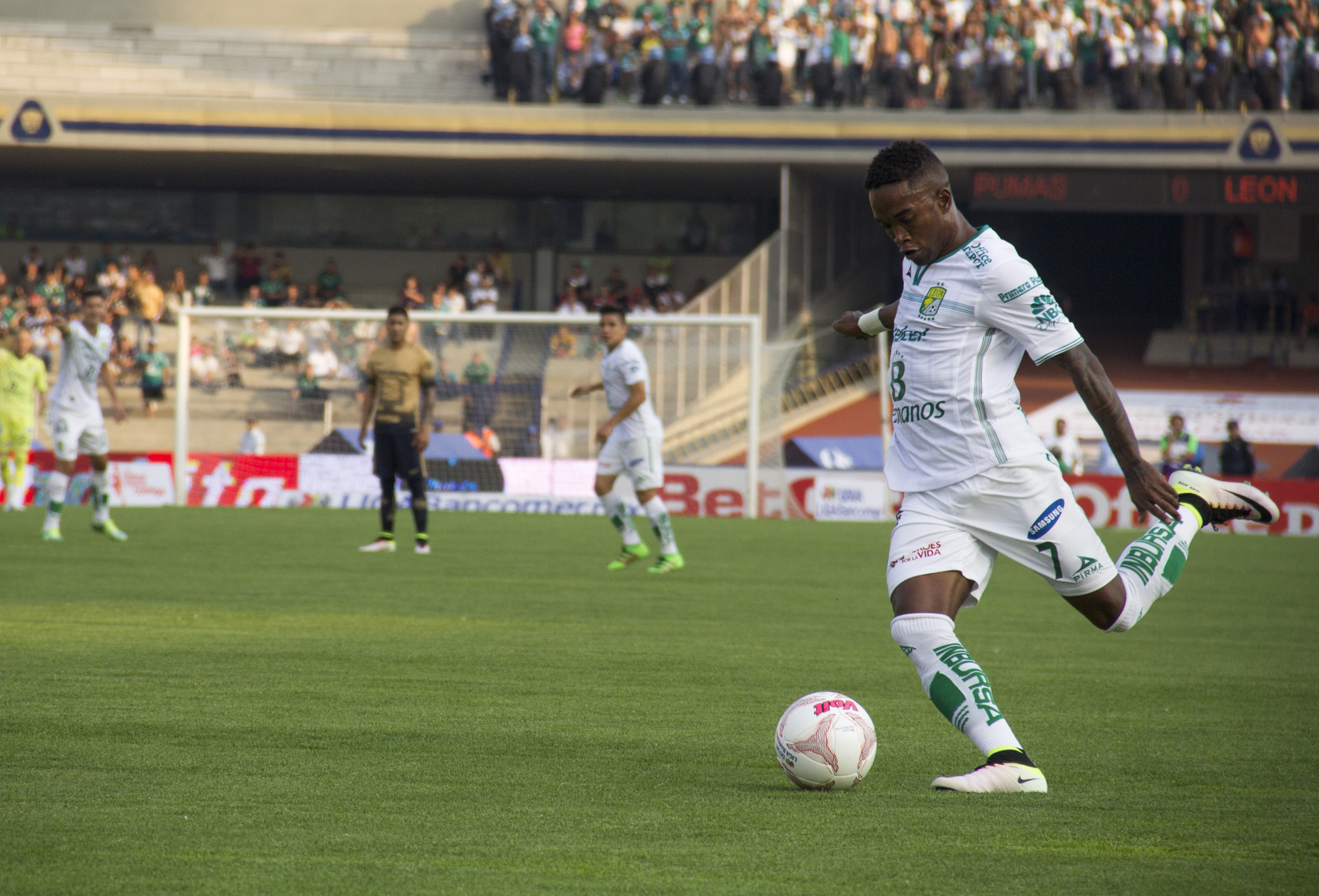 Pumas vs León